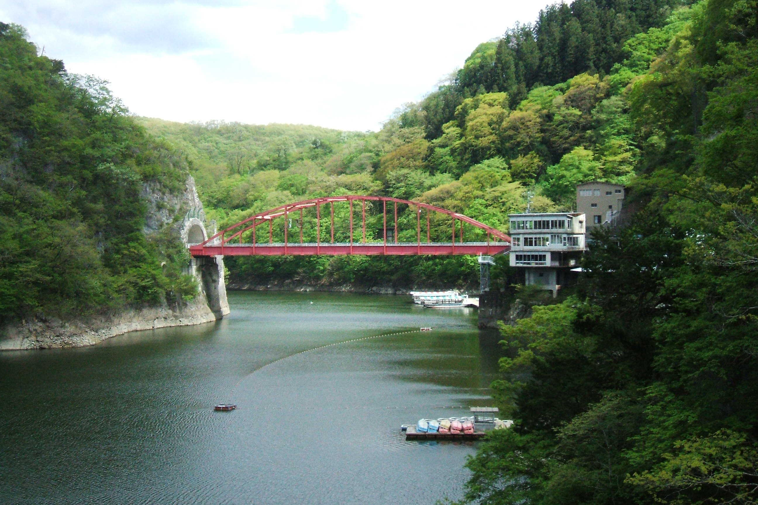 広島県の帝釈峡にかかる紅葉橋